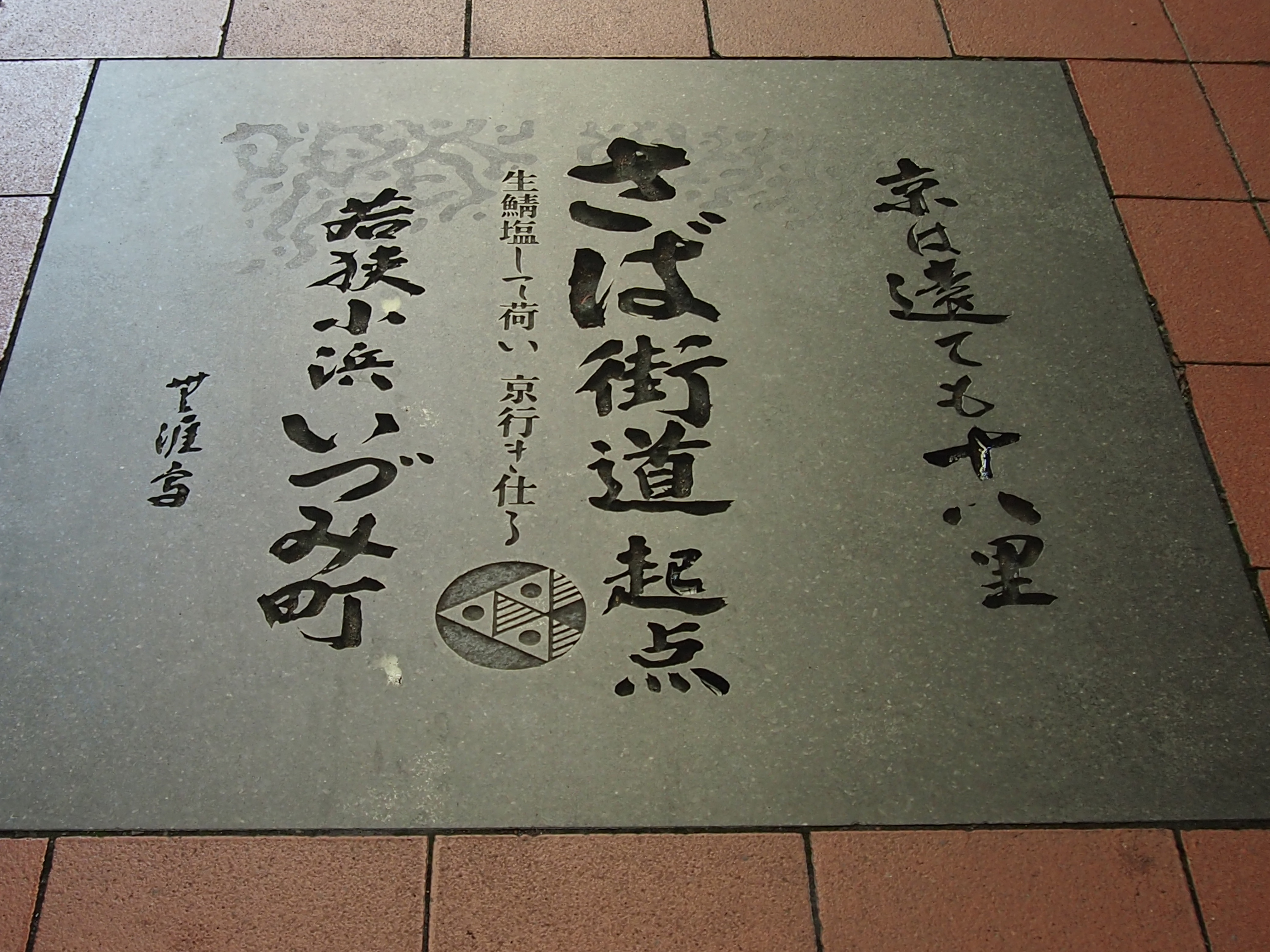 福井県小浜市の鯖街道起点、いづみ町アーケード内にある。